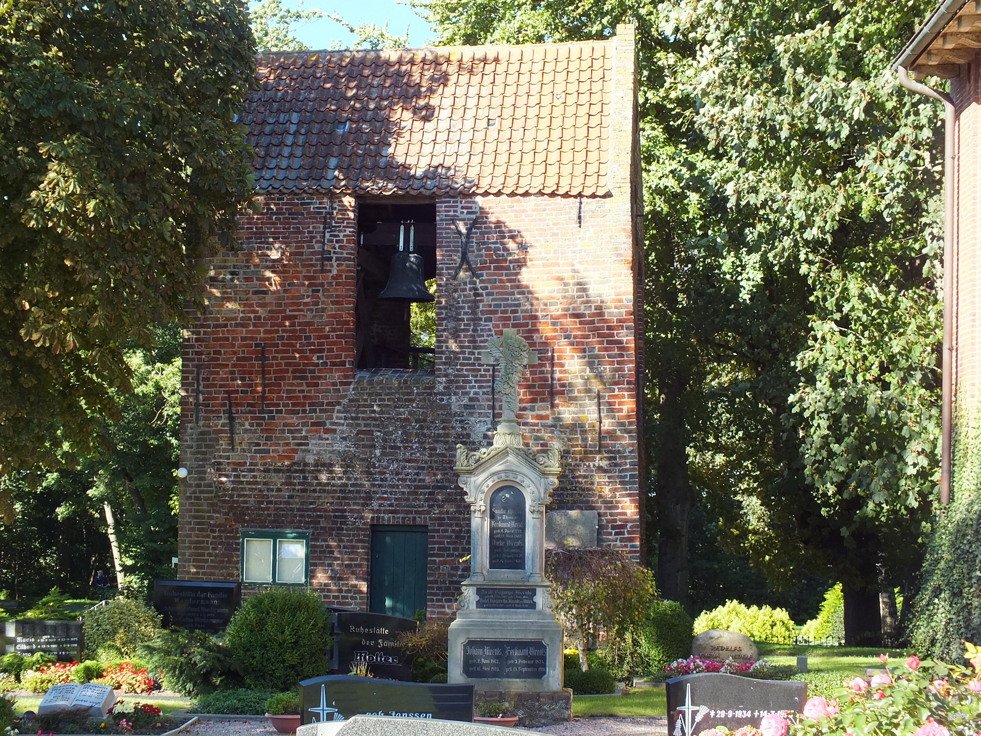 Deitsch: Glockenturm der Kirche in Thunum